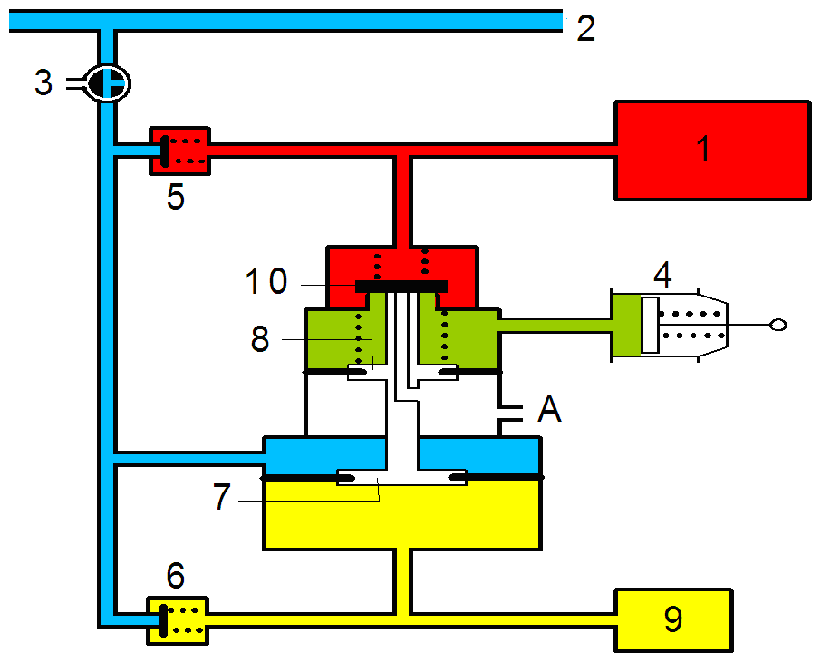 Steuerventil: Abschlussstellung 1 Hilfsluftbehälter 2 Hauptleitung 3 Ausschalthahn 4 Bremszylinder 5 Rückschlagventil 6 Rückschlagventil 7 Steuerkolben 8 Regulierkolben 9 Steuerbehälter 10 Einlassventil A Luftauslass ins Freie Wenn der Druck im Bremszylinder und damit der Druck (grün) im Raum über dem Regulierkolben 8 so weit gestiegen ist, dass die nach unten gerichtete Kraft des Regulierkolbens die nach oben gerichtete Kraft des Steuerkolbens 7 aufzuheben vermag bzw. leicht überwiegt, wird der Steuerkolben und mit ihm der hohle Stößel so weit nach unten bewegt, dass das Einlassventil 10 durch seine Feder auf seinen Sitz gedrückt und geschlossen wird. Die weitere Luftzufuhr aus dem Hilfsluftbehälter nach dem Bremszylinder ist damit abgeschlossen. Weil der hohle Ventilstößel mit dem Einlassventil in Berührung bleibt, ist auch kein Luftaustritt vom Bremszylinder nach dem Freien möglich. Jede weitere Druckverminderung in der Hauptleitung hat eine entsprechende Erhöhung des Drucks im Bremszylinder zur Folge, wobei jede Druckstufe in gleicher Weise abgeschlossen wird. Die volle Bremswirkung wird erreicht, wenn der Druck in der Hauptleitung so weit gesenkt ist, dass zwischen Hilfsluftbehälter und Bremszylinder ein Druckausgleich vorhanden ist.